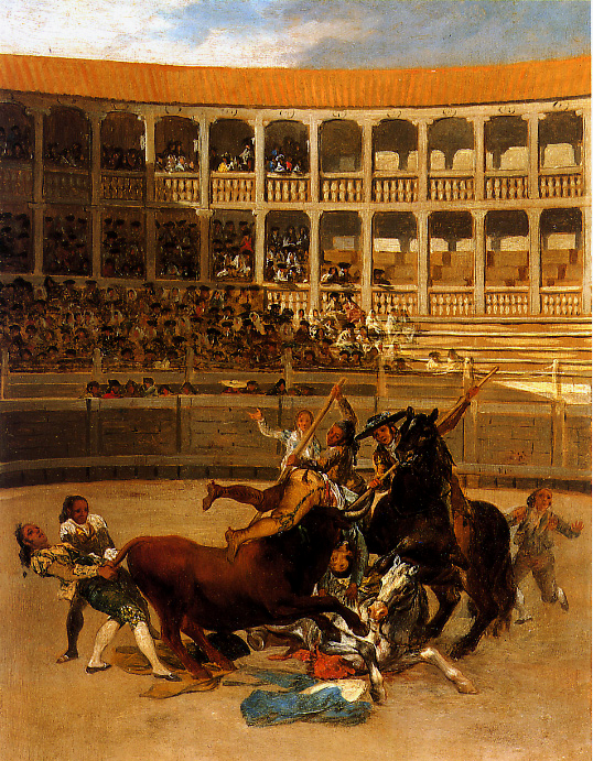 La muerte del picador. Óleo sobre hojalata. 43 x 31 cm. British Rail Pension Trustee Co. (Londres, Reino Unido).